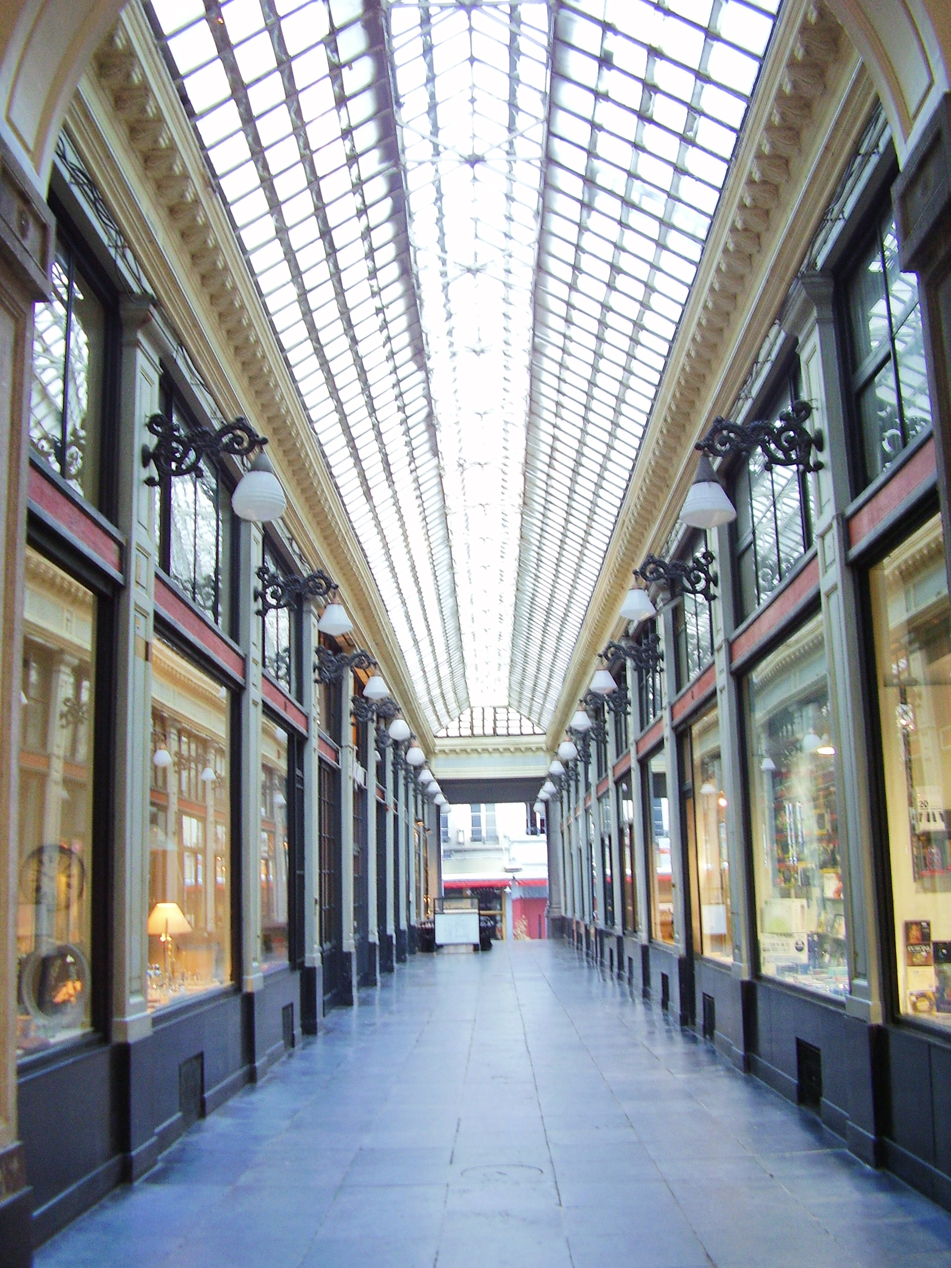 Galerie des Princes, Bruxelles